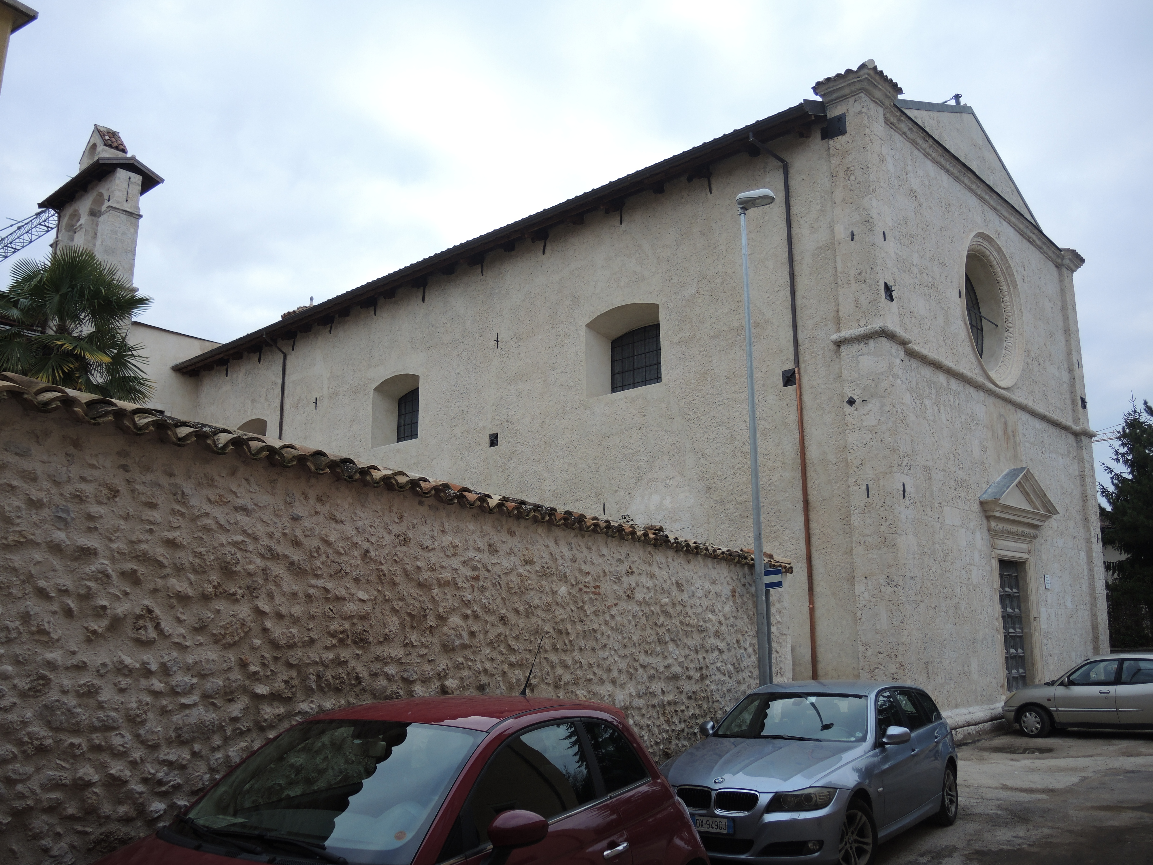 L'Aquila - Chiesa di Santa Maria della Misericordia